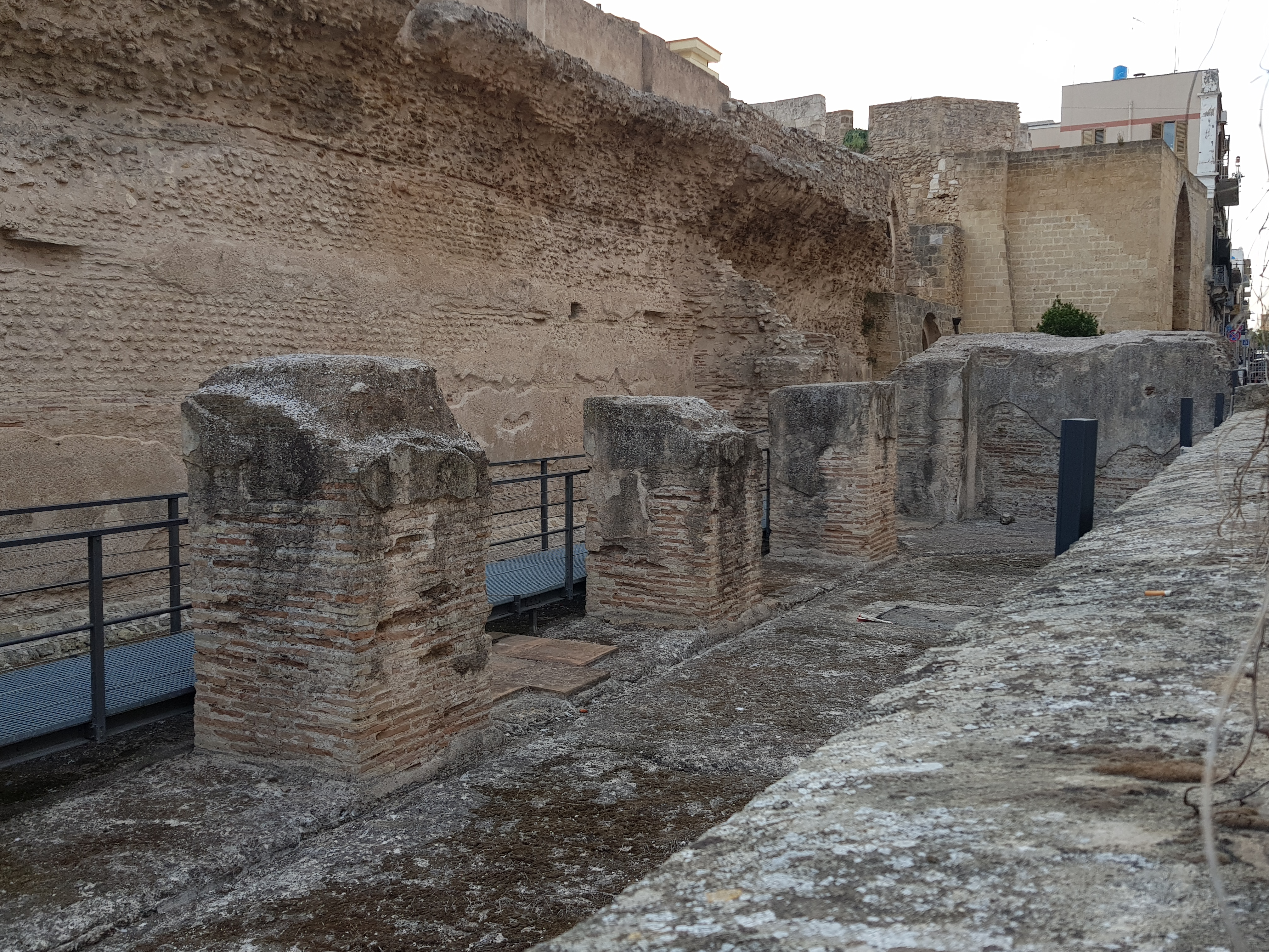 Vasche Limarie This is a photo of a monument which is part of cultural heritage of Italy.